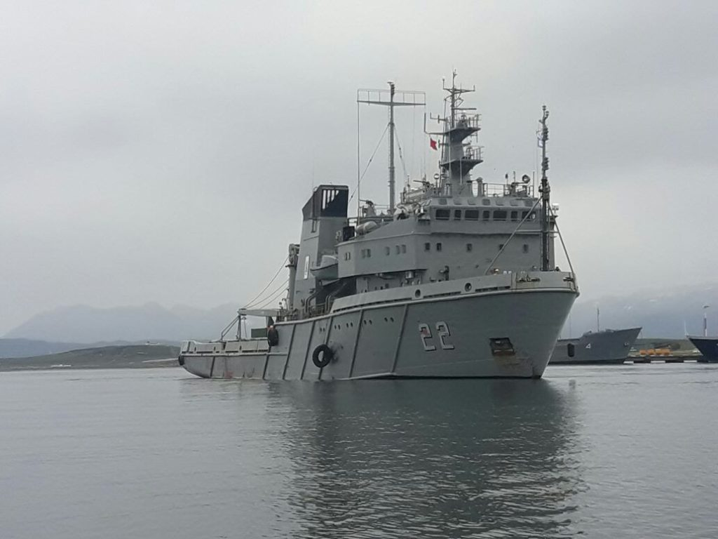 Los buques de la Armada Argentina Canal de Beagle y Estrecho de San Carlos regresaron a los puertos de Buenos Aires y Ushuaia, respectivamente, para reabastecerse y encarar la segunda etapa de la Campaña Antártica de Verano (CAV) 2017/218 organizada por el Ministerio de Defensa. ELl ARA Canal de Beagle dio por finalizada su primera etapa de la CAV al amarrar en la dársena “E” del puerto de Buenos Aires, donde se reaprovisionará para volver a zarpar rumbo al continente blanco. Por su parte, el buque Estrecho de San Carlos ingresó al puerto de Ushuaia para reabastecerse de agua, víveres y combustible y zarpar nuevamente para cumplir con la segunda etapa de la CAV.